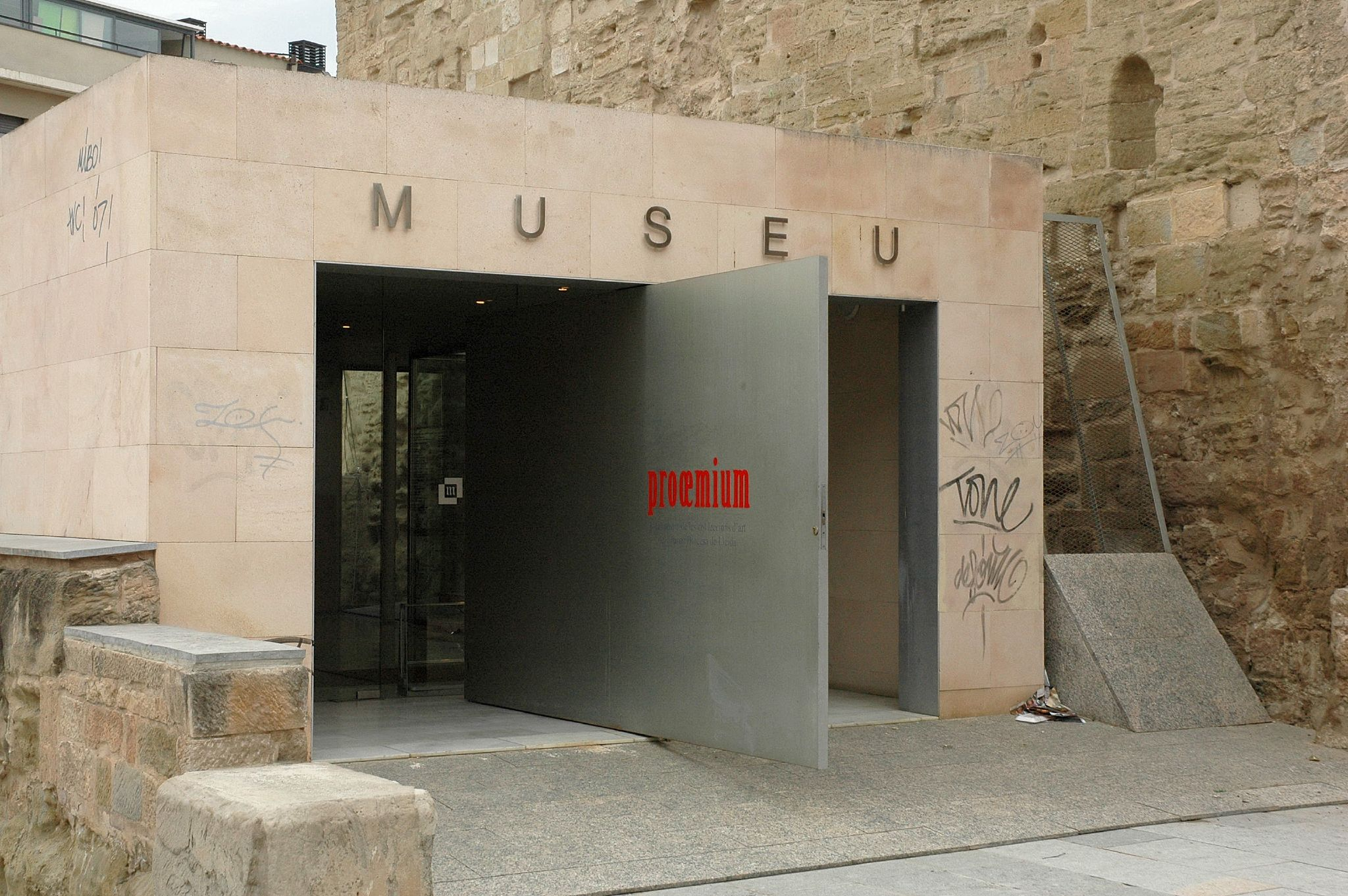 Museu episcopal. Al novembre del 2007 s'inaugura la nova seu.